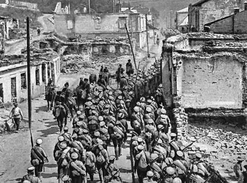 «Вступление наших войск в г. Бучач» // Великая война в образах и картинах : [в 14 вып.] / под ред. Ив. Лазаревского. — М.: Издание Д. Я. Маковского, 1914-1917 (Товарищество типографии А. И. Мамонтова); [Вып. 12]. — 1916. — С. 153.